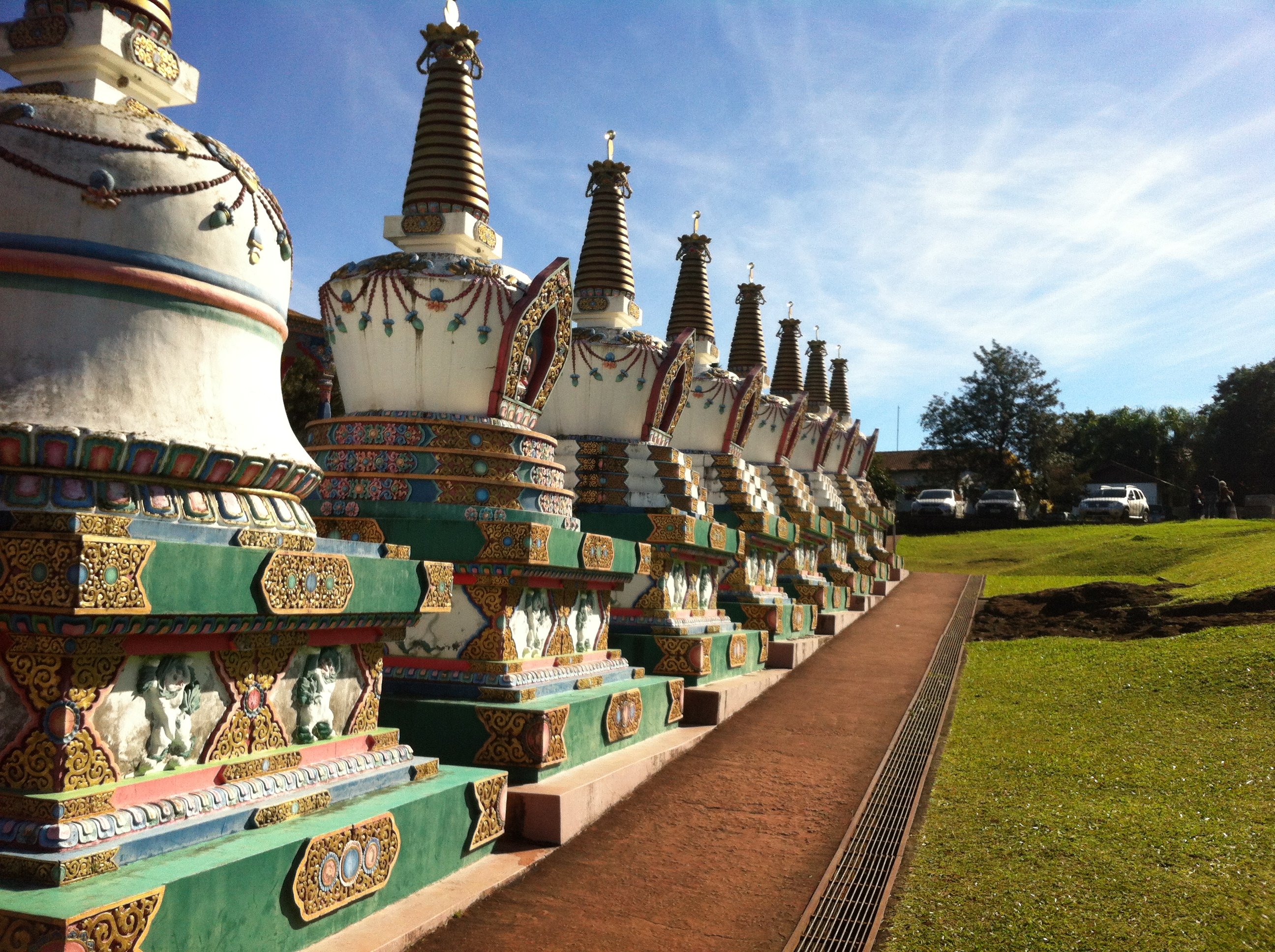 Templo budista de Três Coroas.